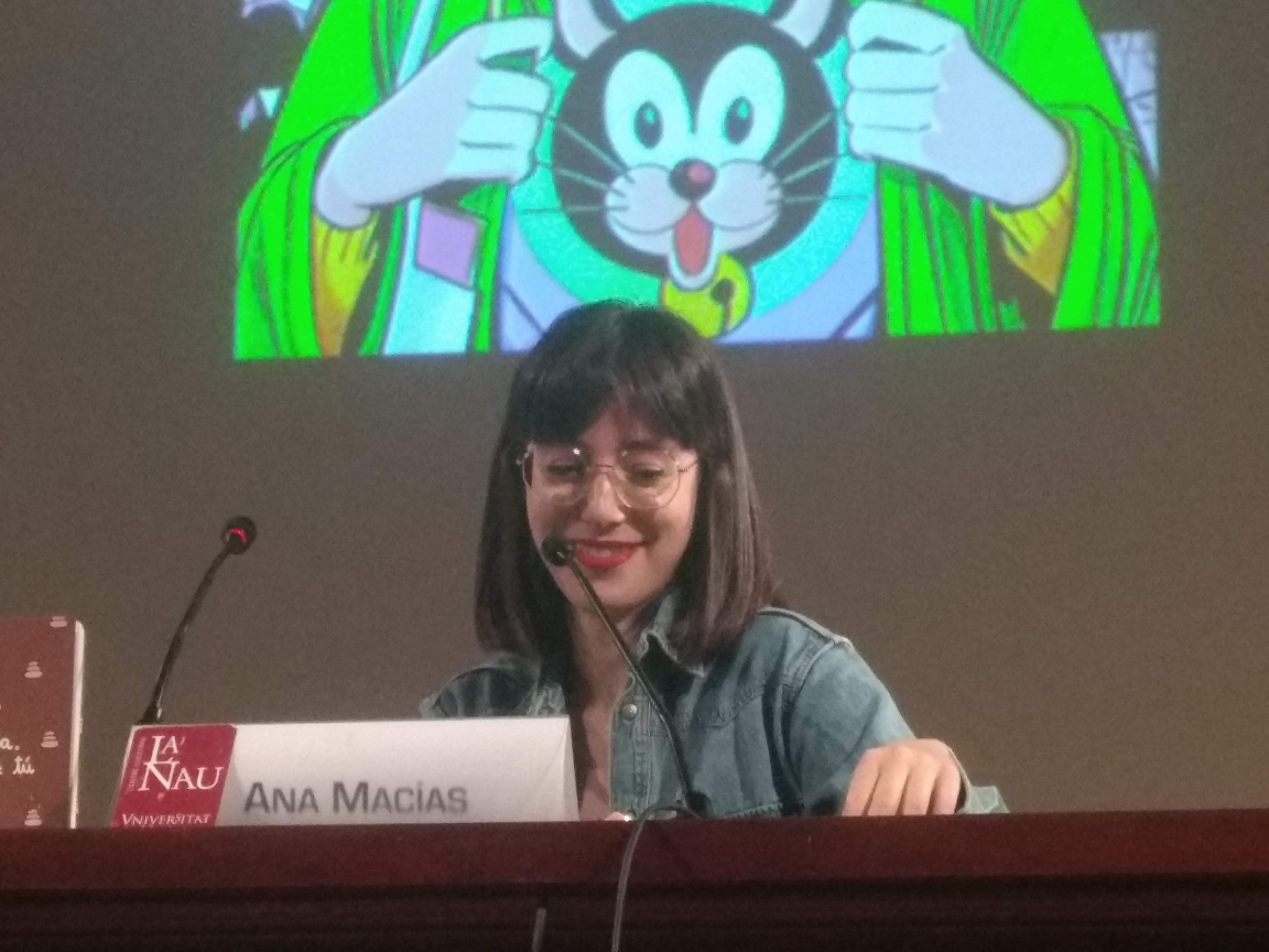 Ana Macías a les Jornades de Còmic de València